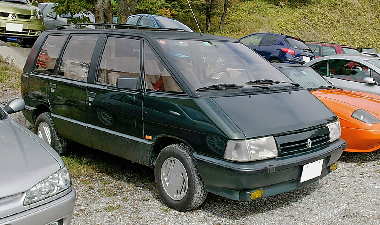 Renault Espace